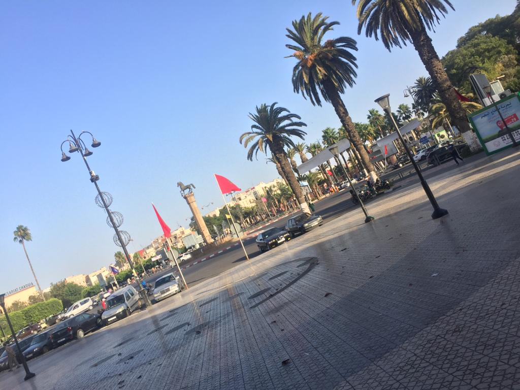 صورة لمدينة سطات من ساحة منشأة حديثا